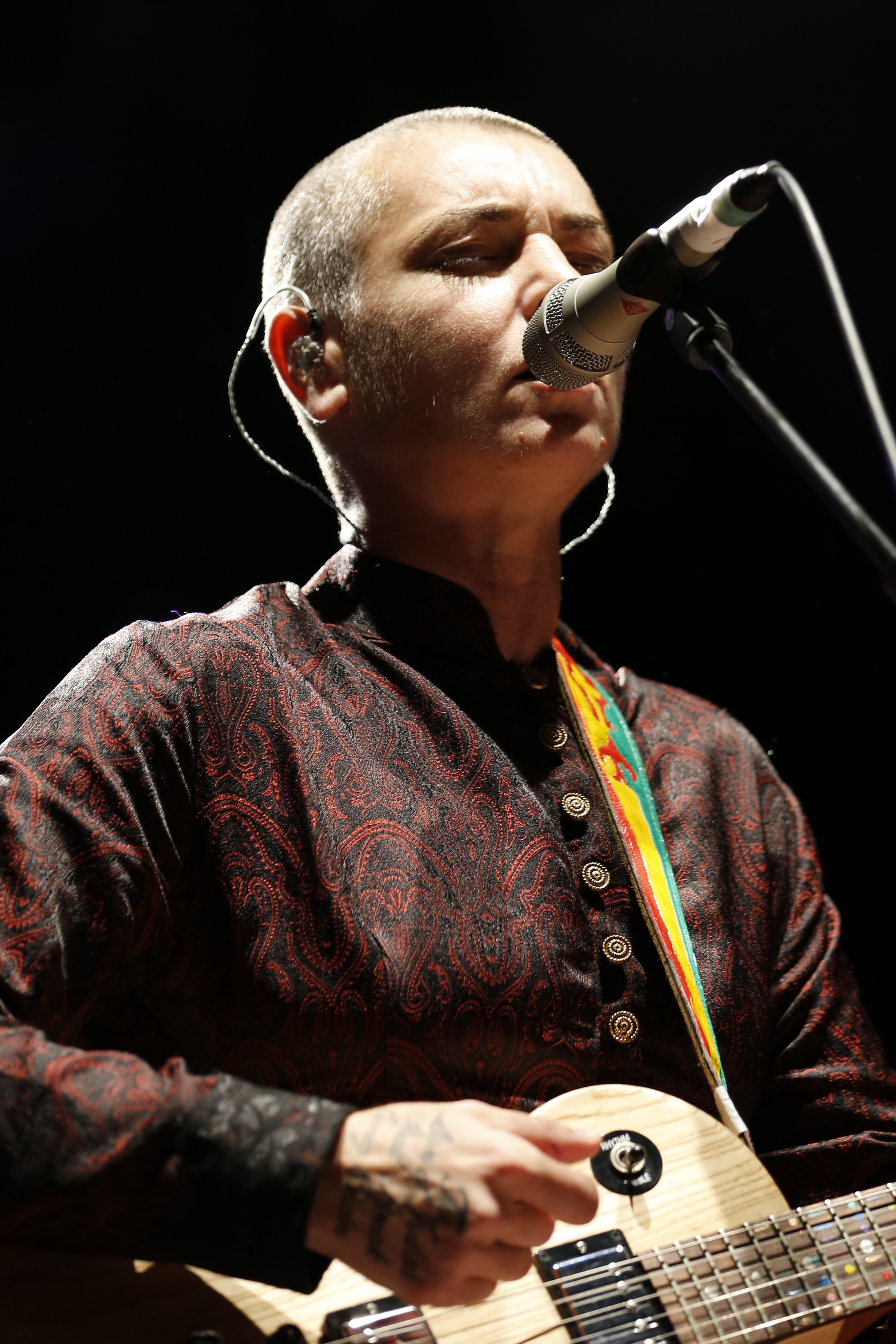 Sinéad O'Connor lors du Festival interceltique de Lorient, le 10 août 2013.